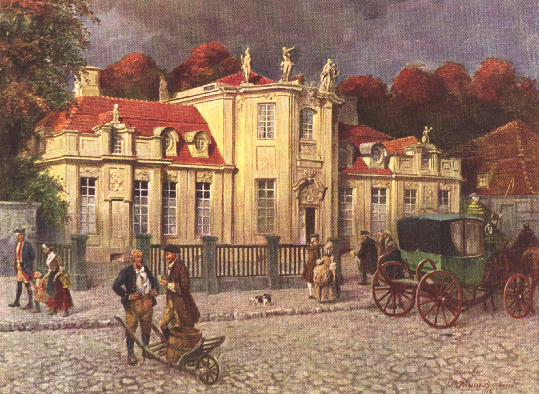 Preußisches Logenhaus; Ansicht nachbearbeitet (geglättet, beschnitten)